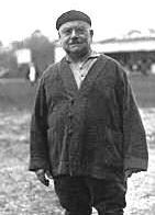 Portrait de Charles Brennus, vers 1920